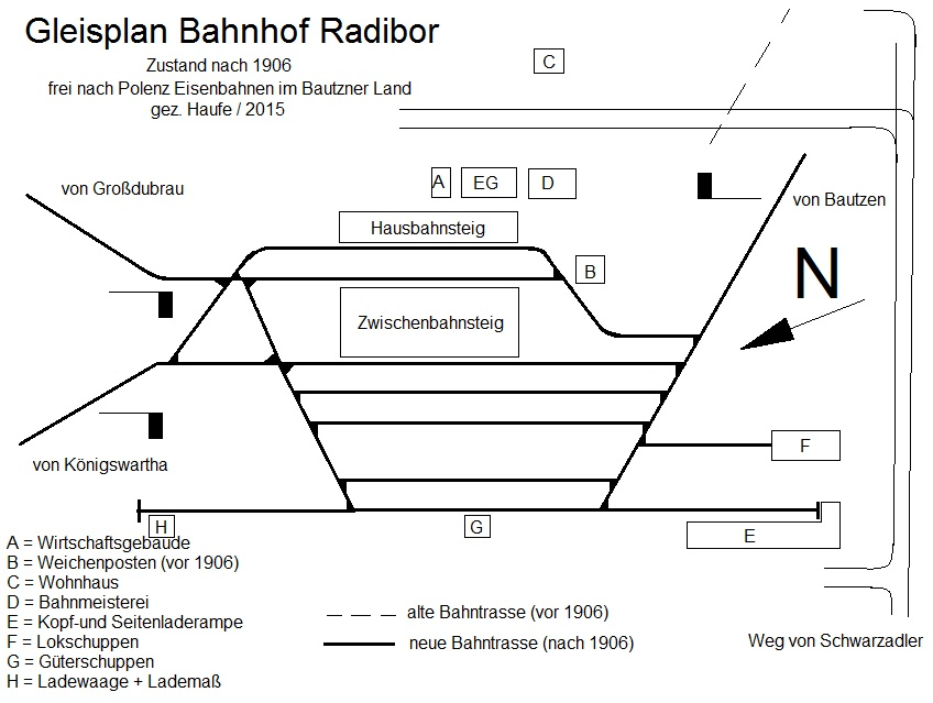 Gleisplan Bahnhof Radibor im Zustand nach 1906